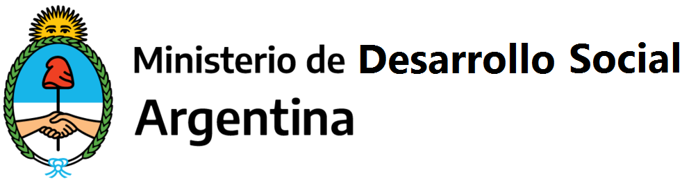 Ministerio de Desarrollo Social